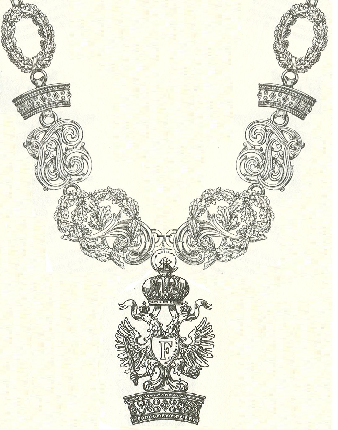 Scan van Blz.276 en 282 van het boek "Handbuch der Ritter- und Verdienstorden " uitgegeven 1893 door Weber.Tekening van de in 1902 overleden Maximilian Gritzner. Robert Prummel 10 jul 2008 16:40 (CEST)